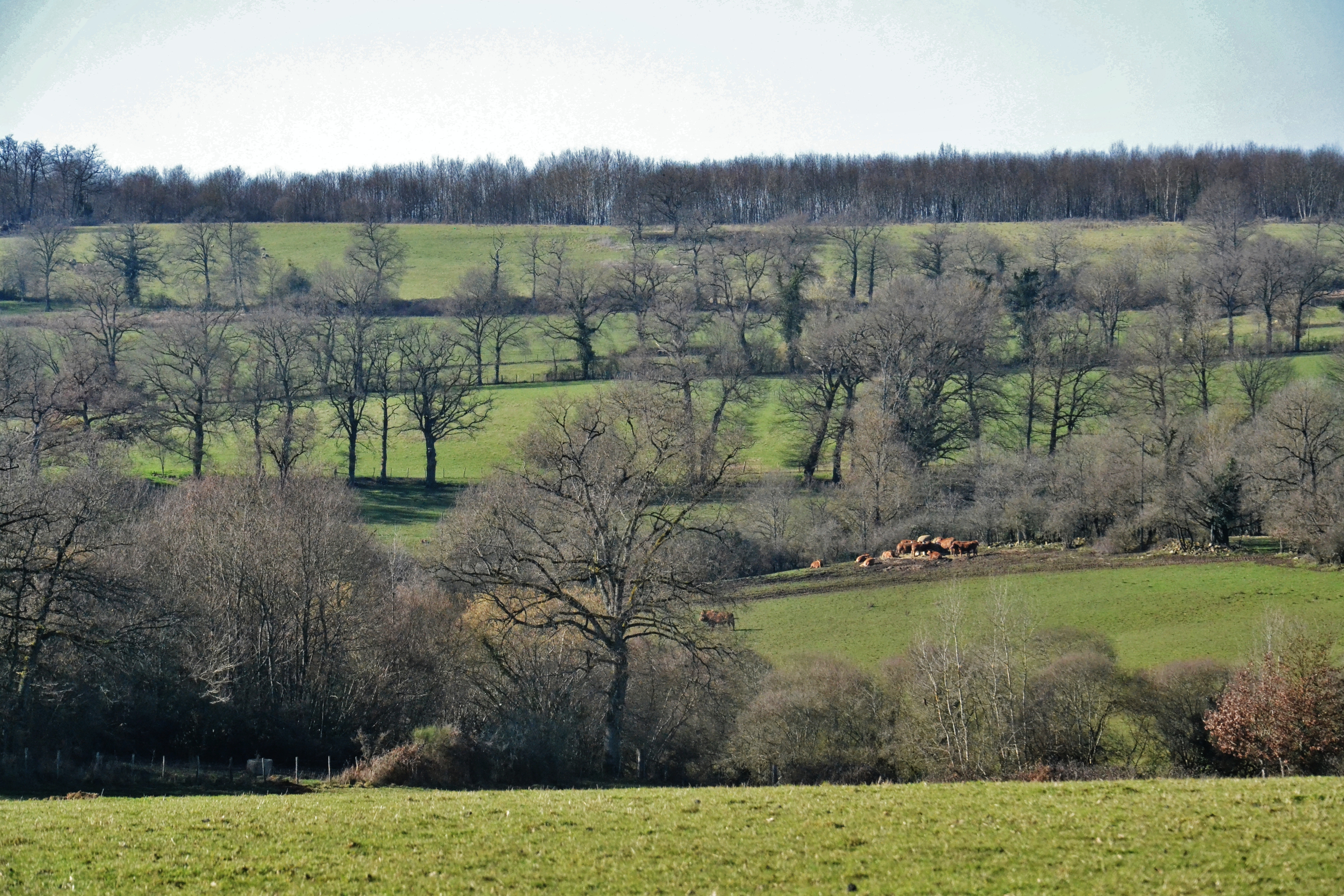 Paysage hivernal de semi-bocage, dans la campagne limousine, près de Solignac (Haute-Vienne, France)